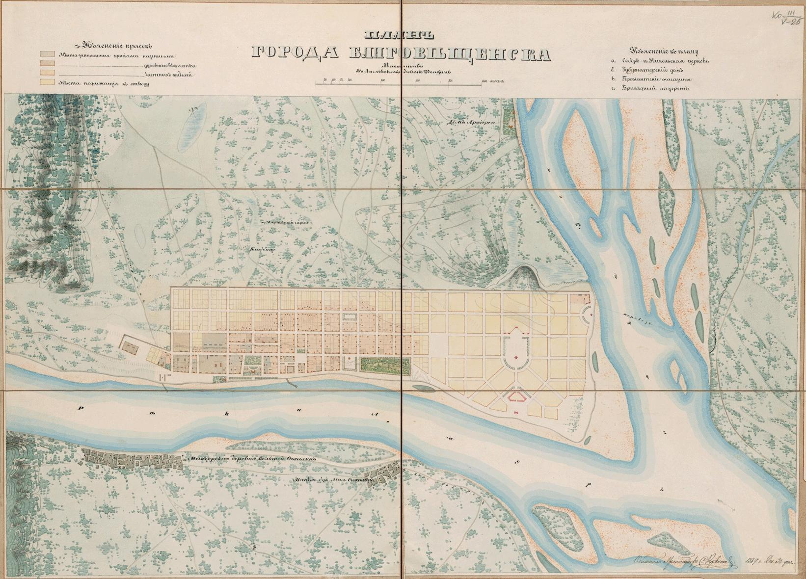 План города Благовещенска (1869 год)